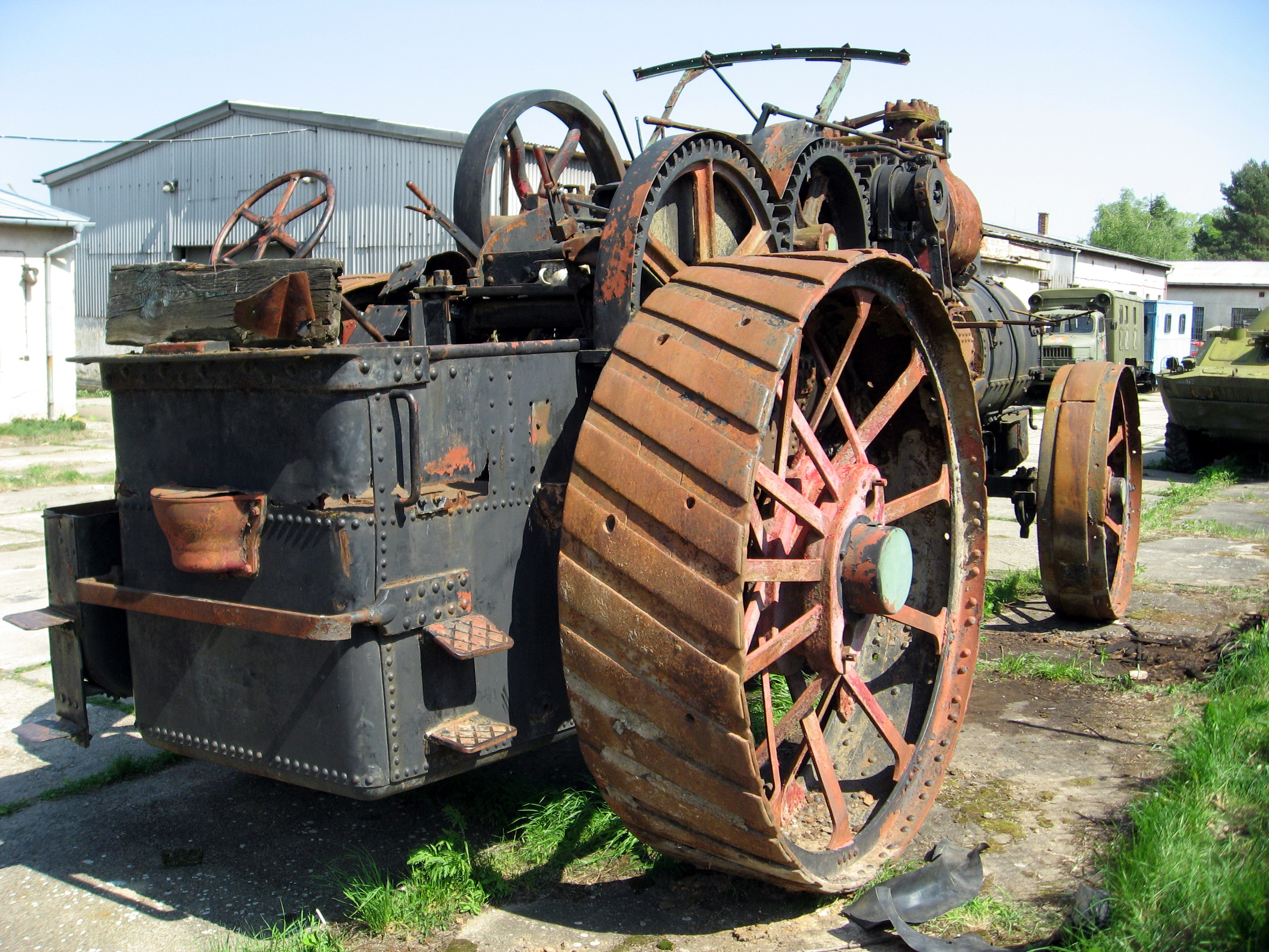 Den otevřených dveří areálu MHD Řečkovice Technického muzea v Brně